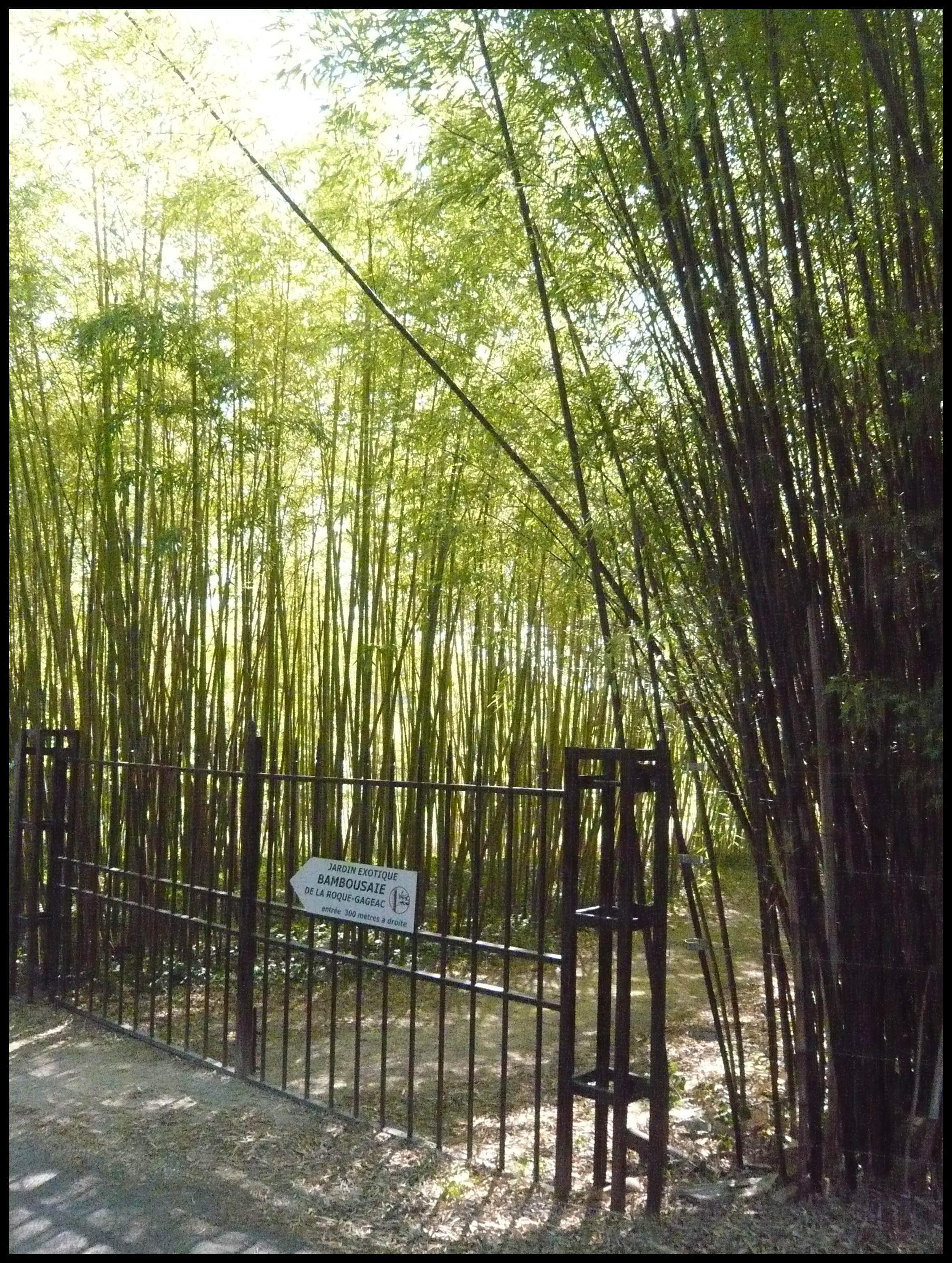 Bambousaie de La Roque-Gageac (Dordogne) avec panneau. Entrée secondaire.